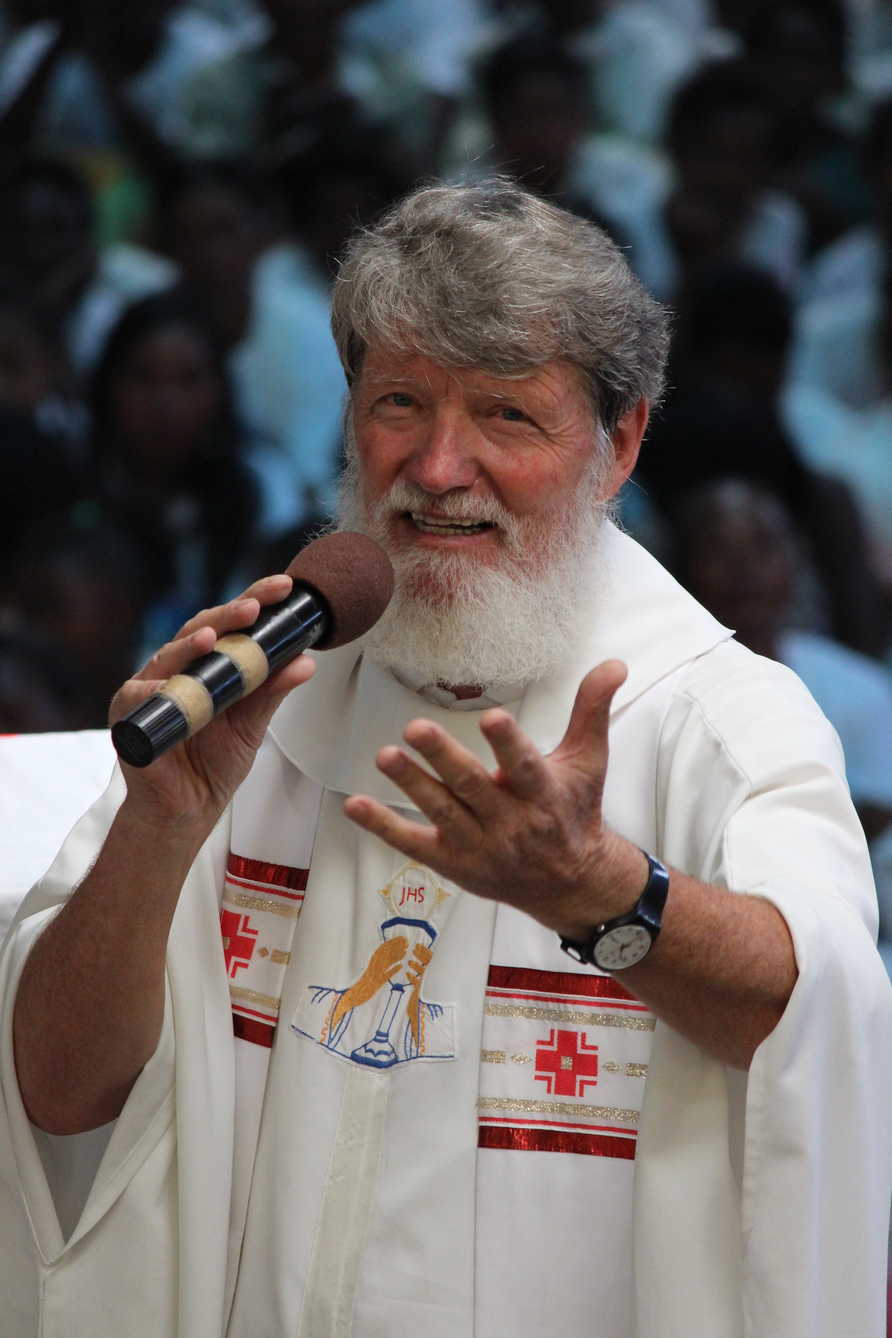 Messe anniversaire pour les 25 ans d'Akamasoa - 19 octobre 2014